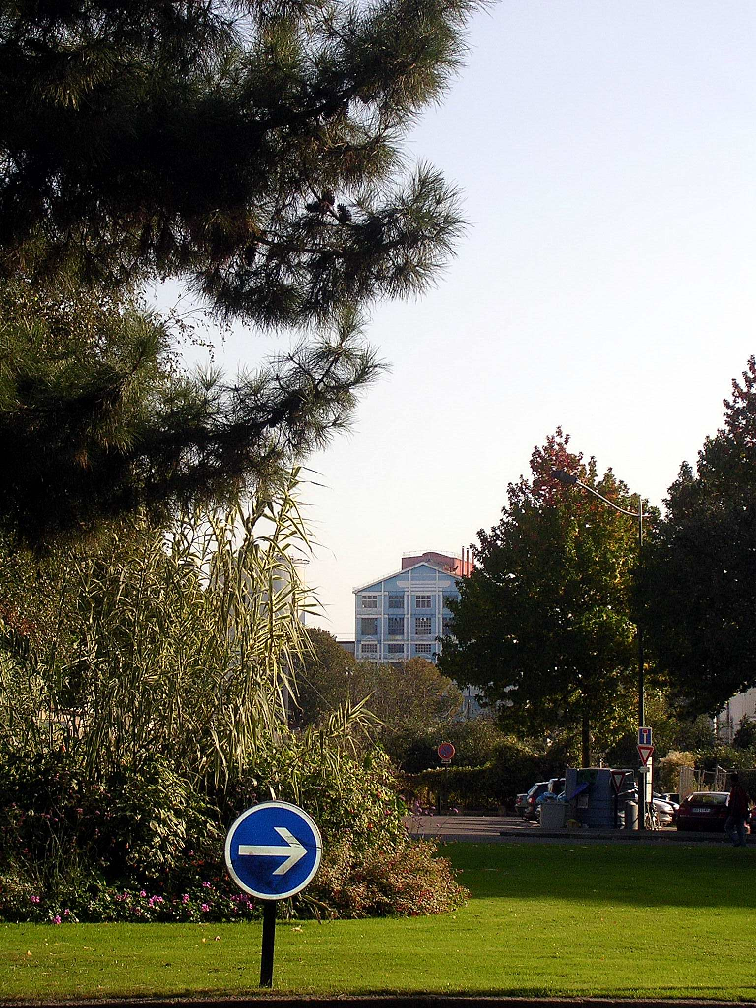 Place de la République (Nantes), vue sur le rond-point arboré et l'ex usine Béghin-Say (bleue et blanche) en arrière fond